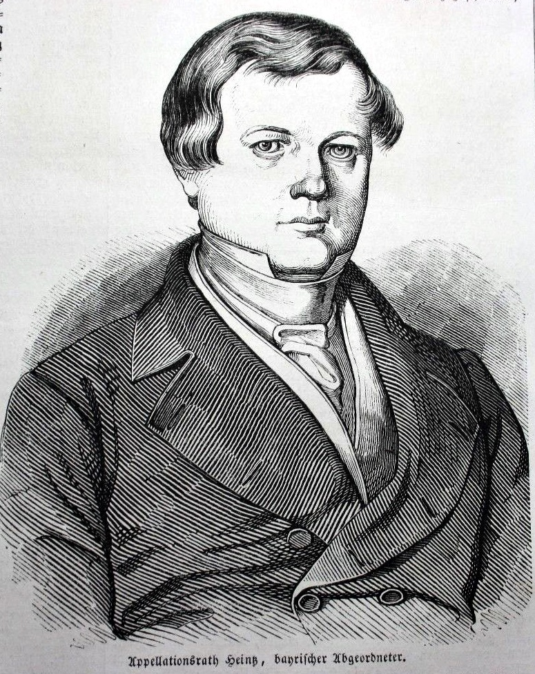 Carl Friedrich Heintz (1802-1868), bayerischer Justizminister